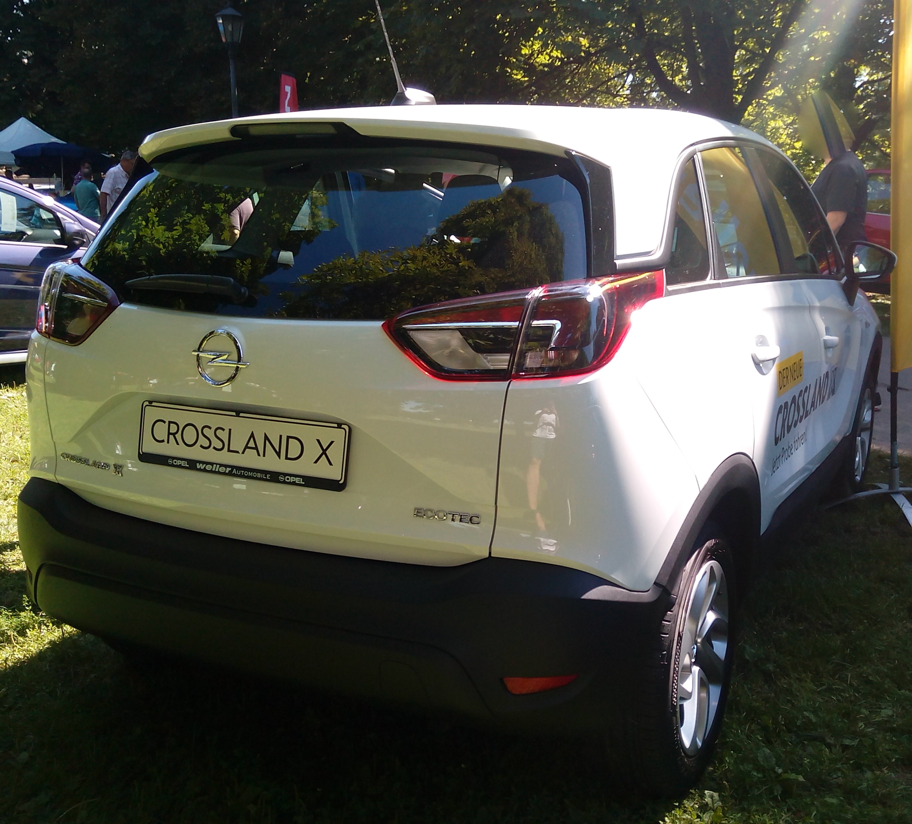 Opel Crossland X auf der Automesse Monrepos